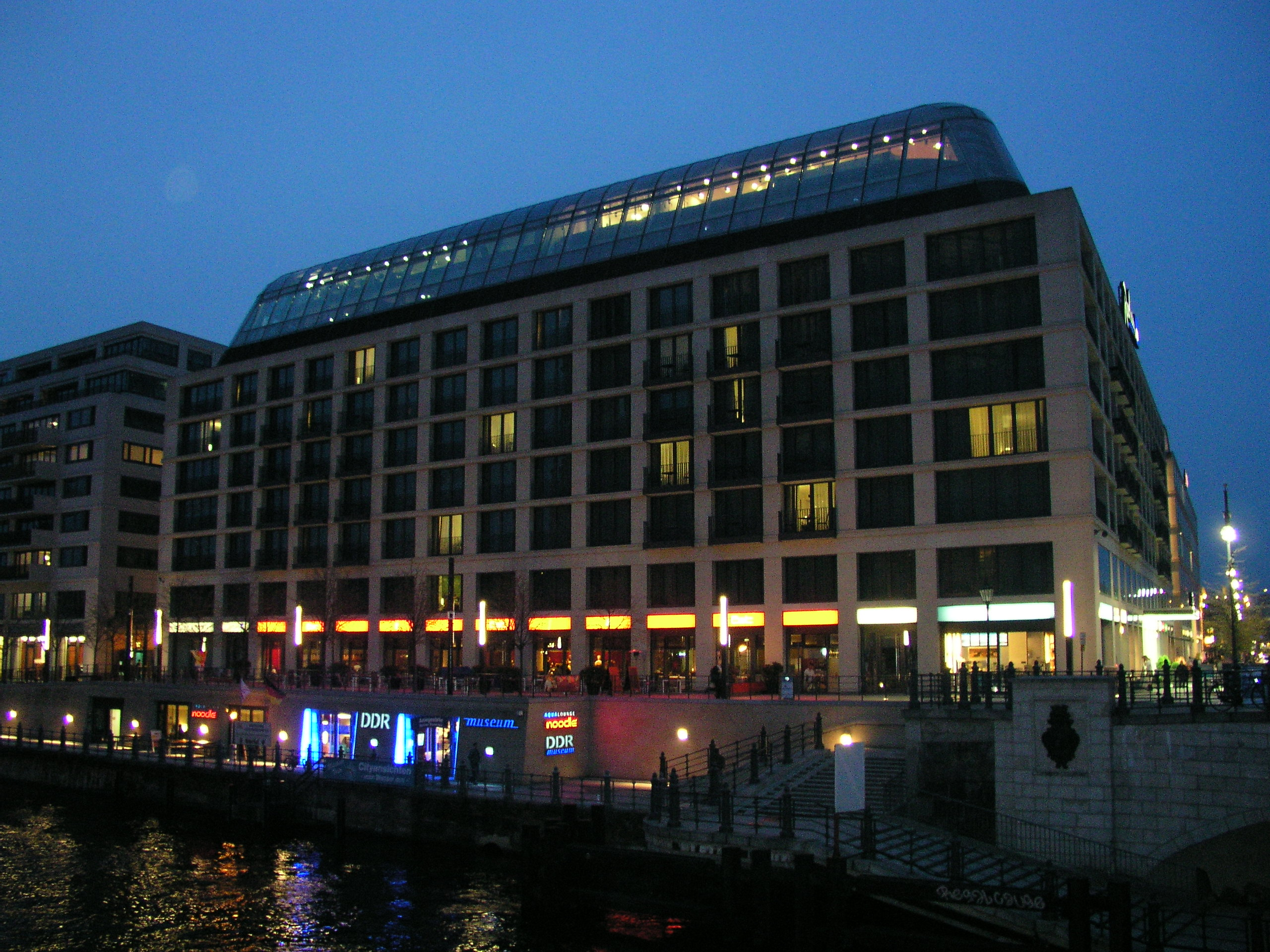 Hotel und DDR-Museum an der Liebknechtbrücke in Berlin-Mitte